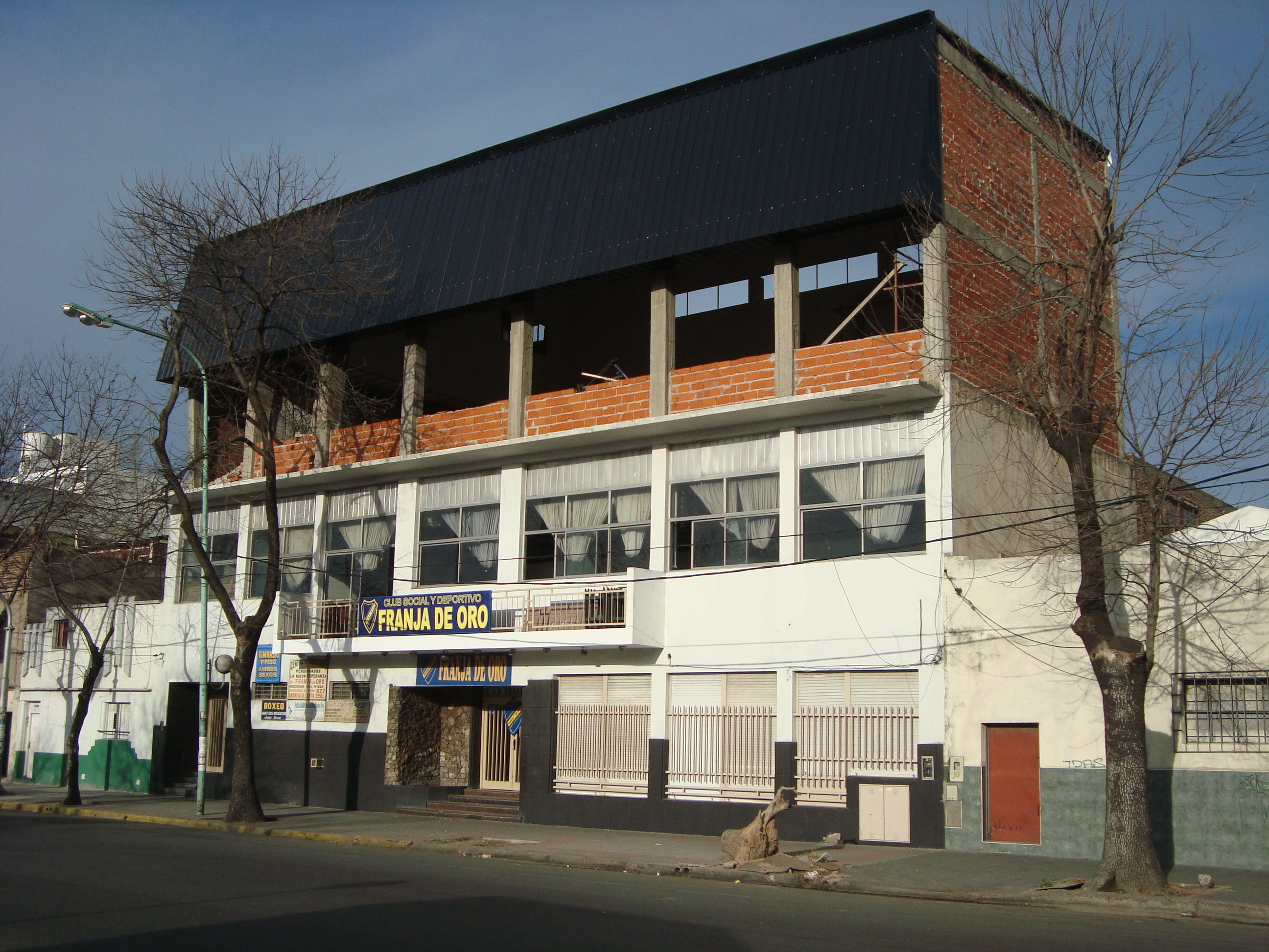 Frente de la sede social del Club Franja de Oro.